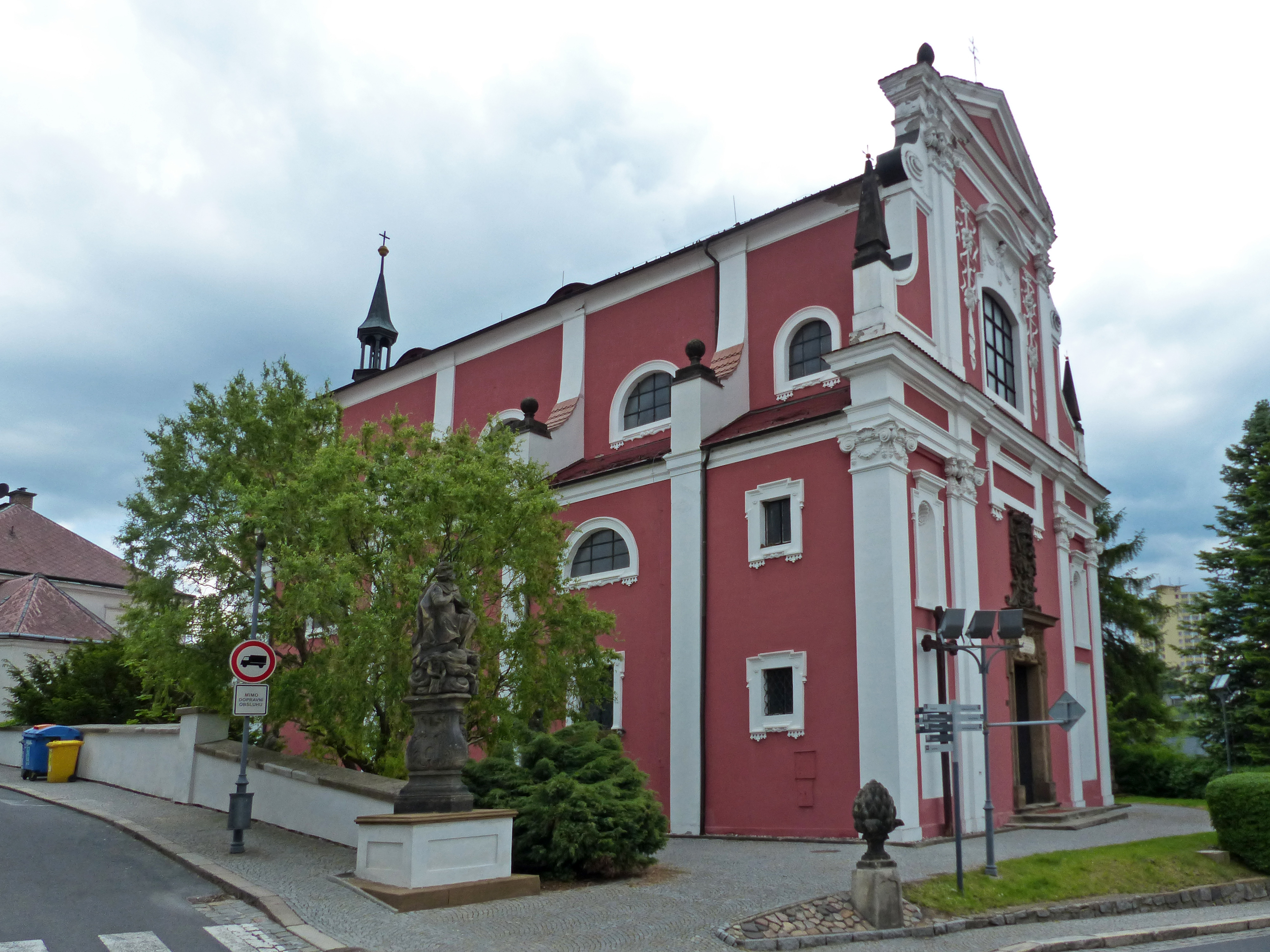 Dreifaltigkeitskirche in Klösterle an der Eger